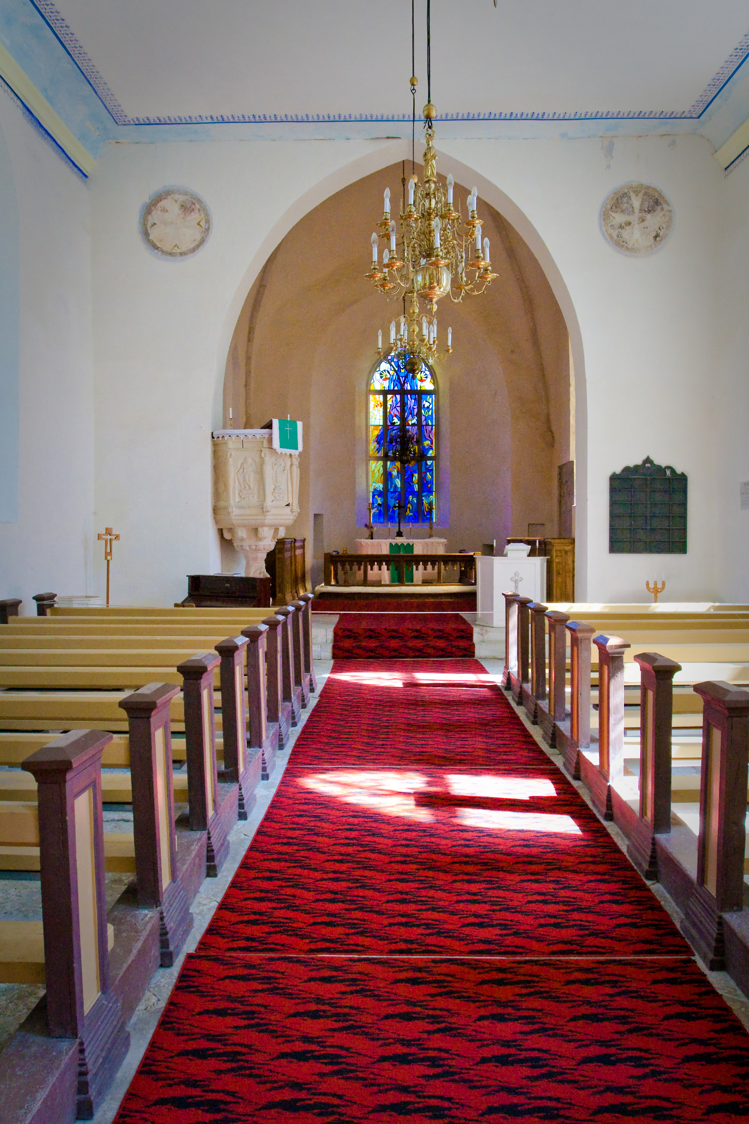 Pühalepa Church in Hiiumaa, Estonia.